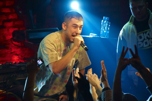 Sokół i Koras podczas koncertu we wrocławskim klubie Alibi